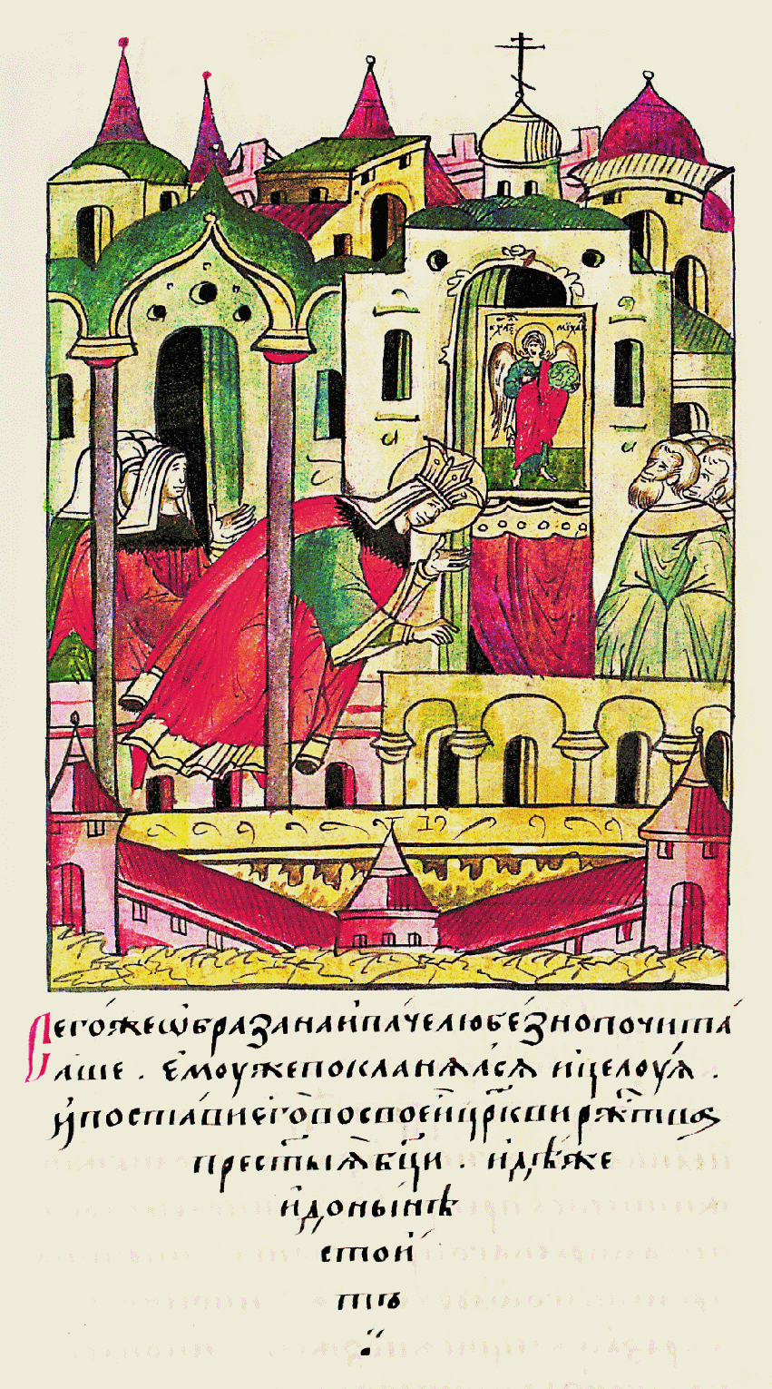 Этот образ стала она особенно почитать, по- клоняться ему, цело- вать, поставила его в своей церкви Рожде- ства Пресвятой Бого- родицы, где находится он и доныне.